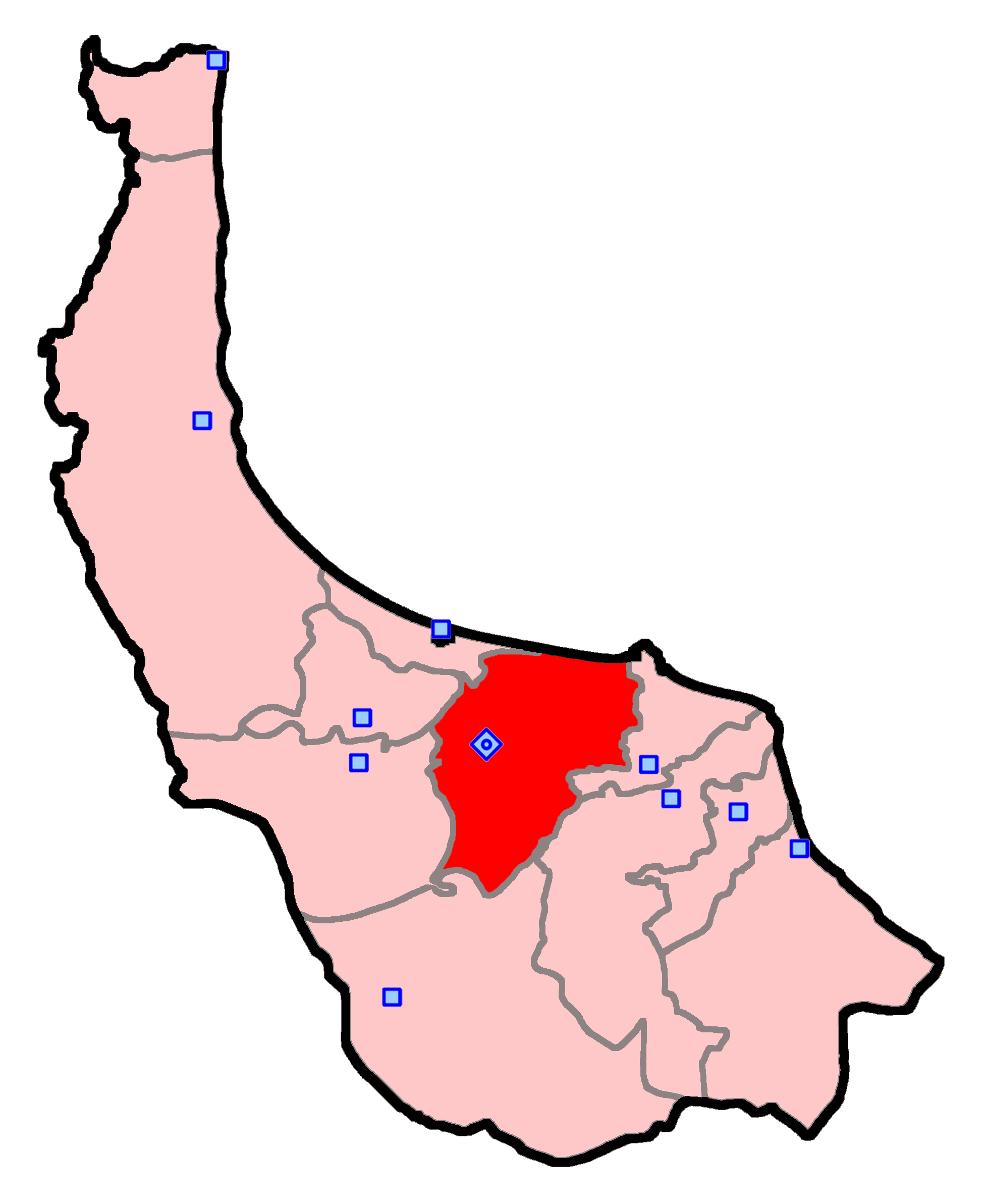 رشت برای انتخابات مجلس شورای اسلامی